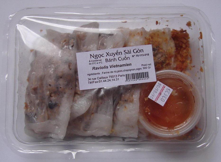 Bánh cuốn thương phẩm do cơ sở Ngọc Xuyến Sài Gòn sản xuất, bán tại các siêu thị châu Á ở Paris, 2006.